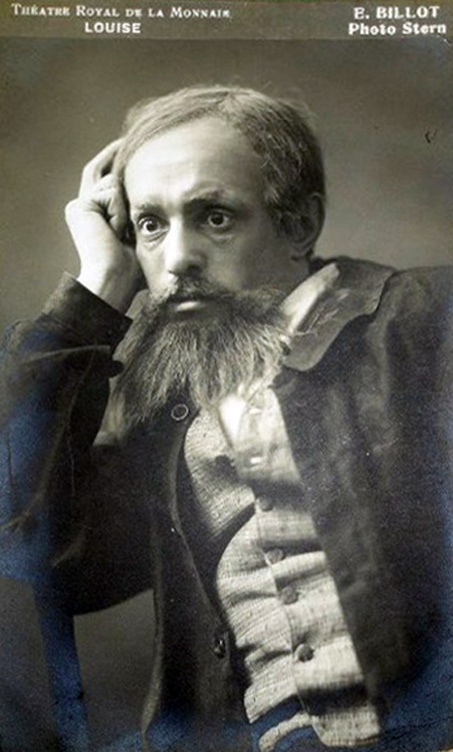 Portrait d'artiste du baryton Etienne Billot